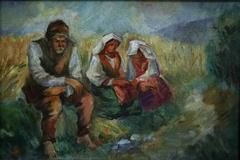 Иван Ангелов (1864-1924). Почивка.